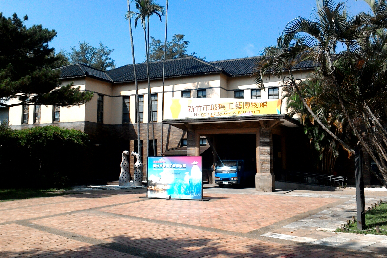 新竹市立玻璃工藝博物館,台灣省新竹市東區東勢聯里公園里